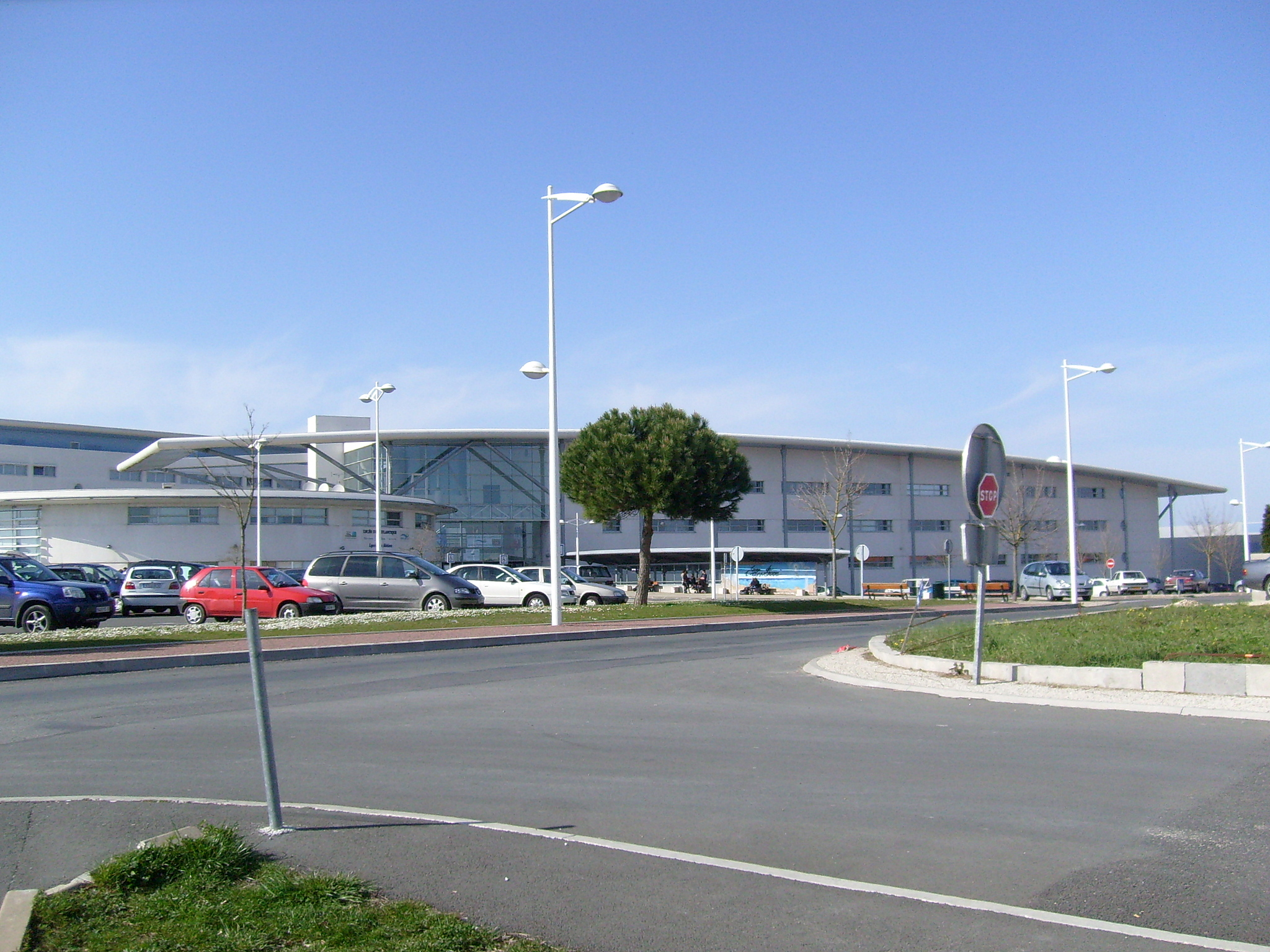 Photographie de Cobber17